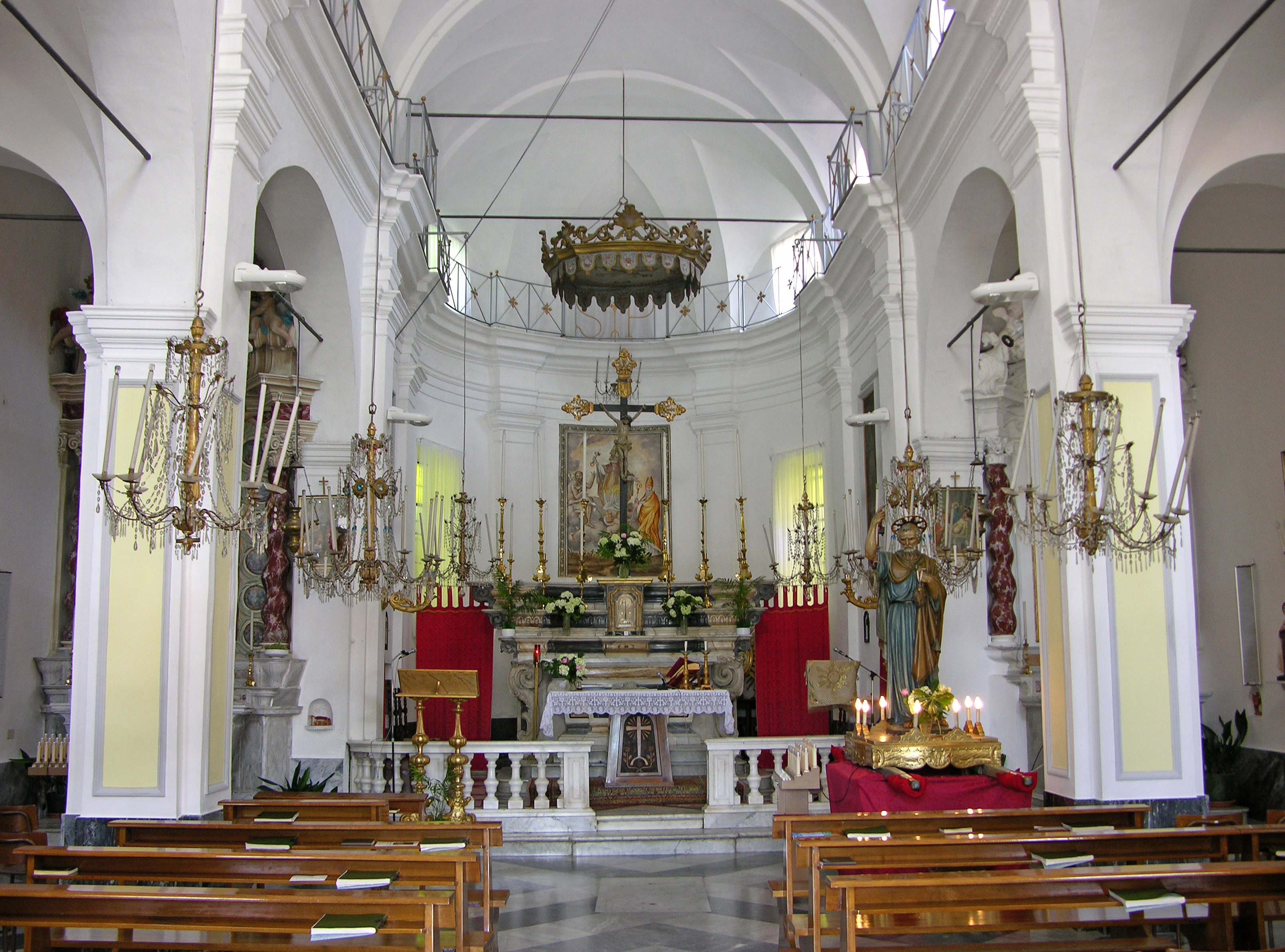 Interno della Chiesa di S. Pietro Apostolo nel comune di Davagna (GE)